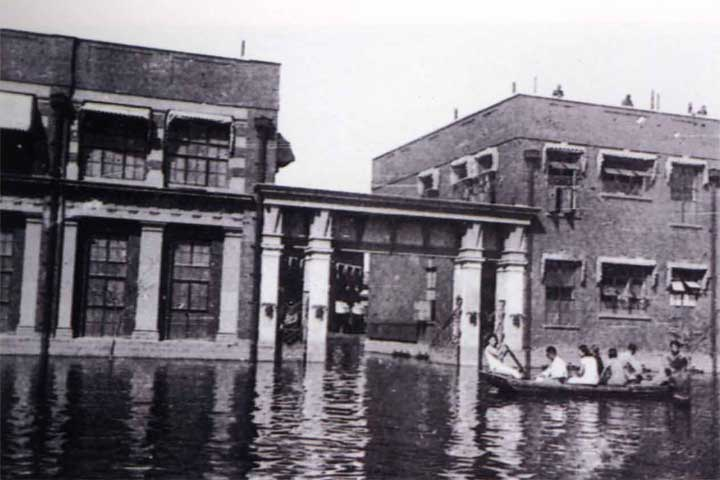 1939年摄于墙子河